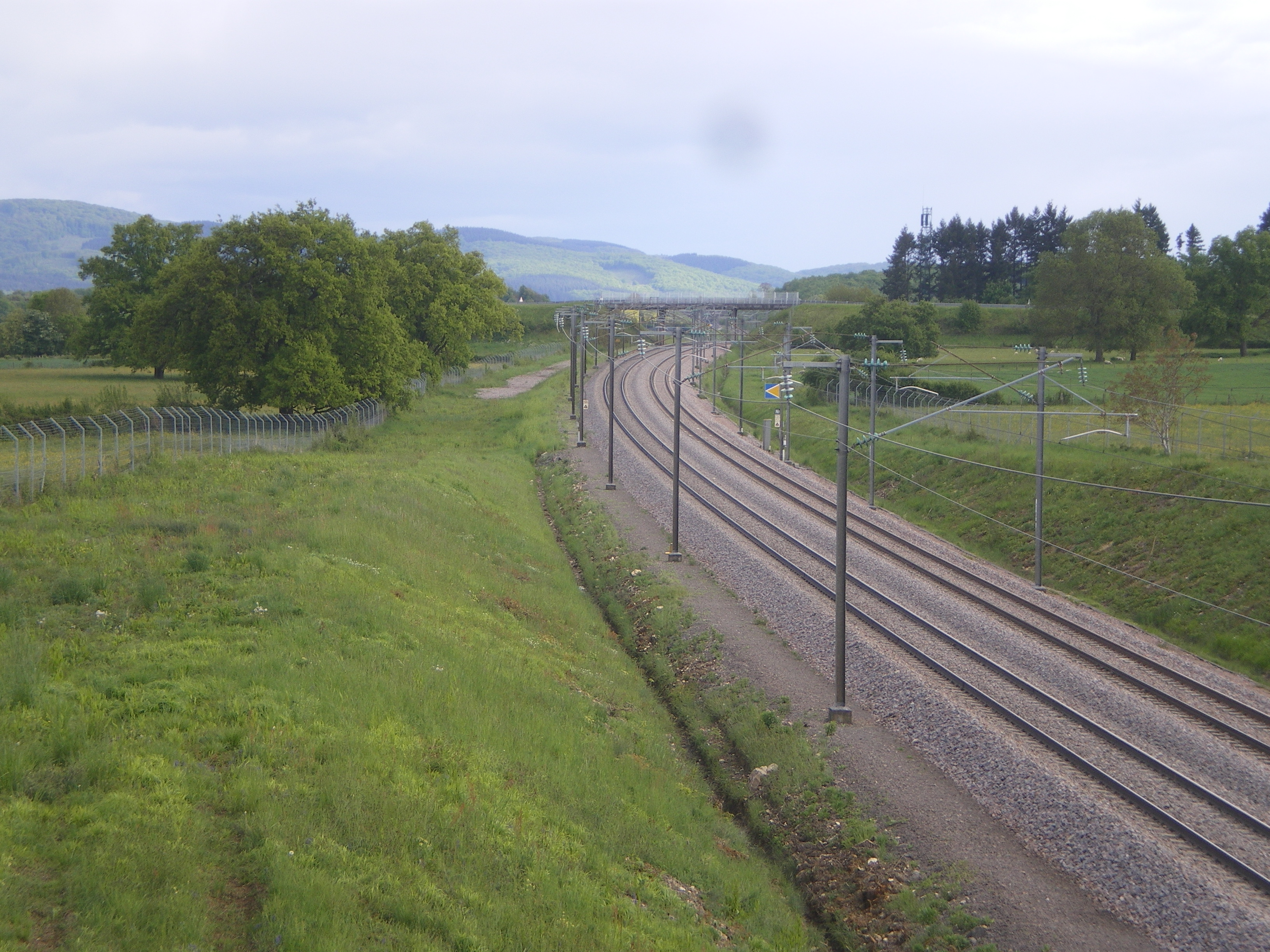 La LGV sud-Est à Massilly (71)